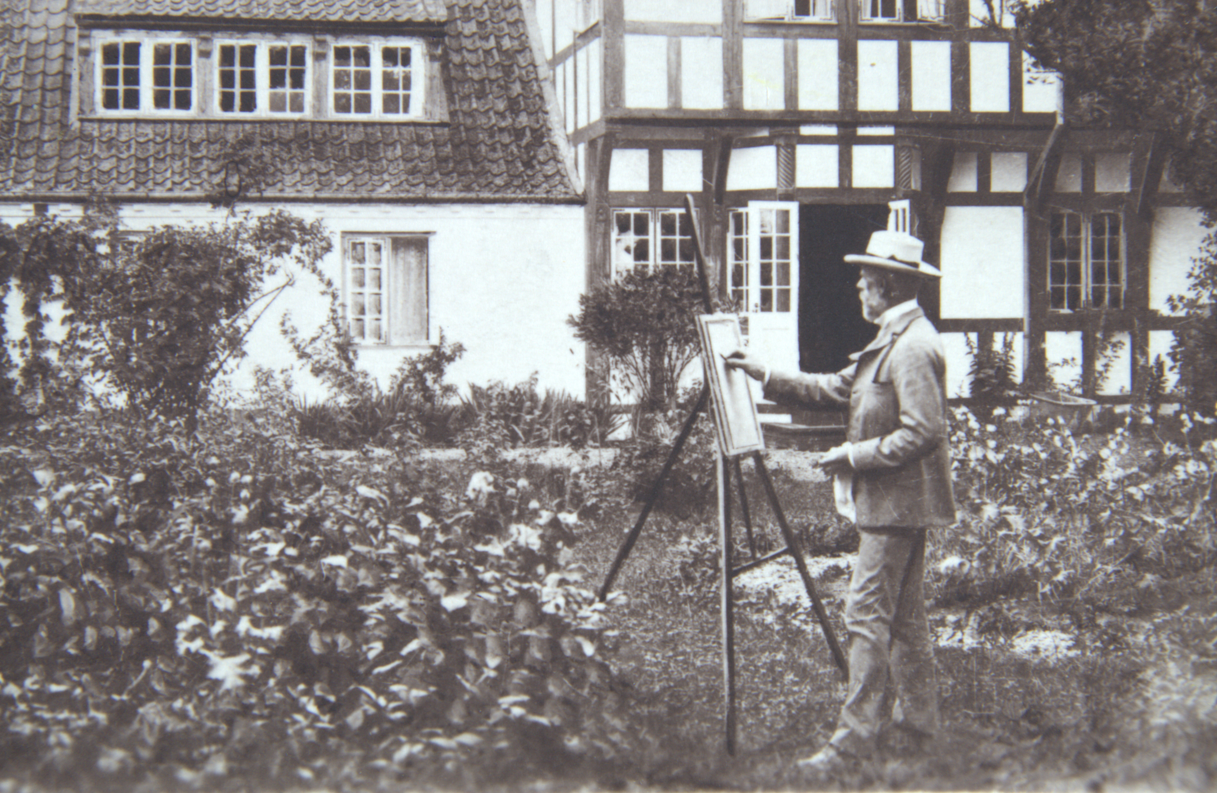 Laurits Tuxen maler ved staffeli i haven ved Villa Dagminne (beskåret)